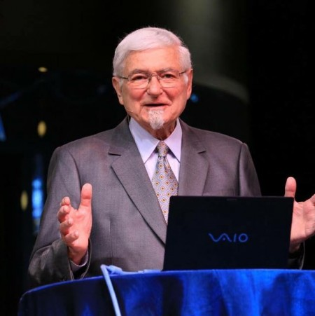 Peter Wagner foi presidente do Global Harvest Ministries, fundado em 1992, do World Prayer Center, e de outras instituições. Foi chanceler do Wagner Leadership Institute (WLI), fundado em 1998. Wagner foi um dos membros fundadores da International Coalition of Apostles (ICA), organização que reúne centenas de apóstolos em várias nações, e foi seu Apóstolo Presidente até 2010, quando passou a presidência para John P. Kelly, e se tornou Presidente Emérito da instituição. Peter Wagner também escreveu mais de 70 livros, todos relativos a assuntos teológicos. Ele e sua esposa viviam em Colorado Springs, Colorado, teve três filhos, nove netos e três bisnetos.